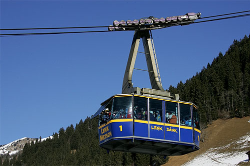 Bergbahnen Lenk: Lenk - Metsch